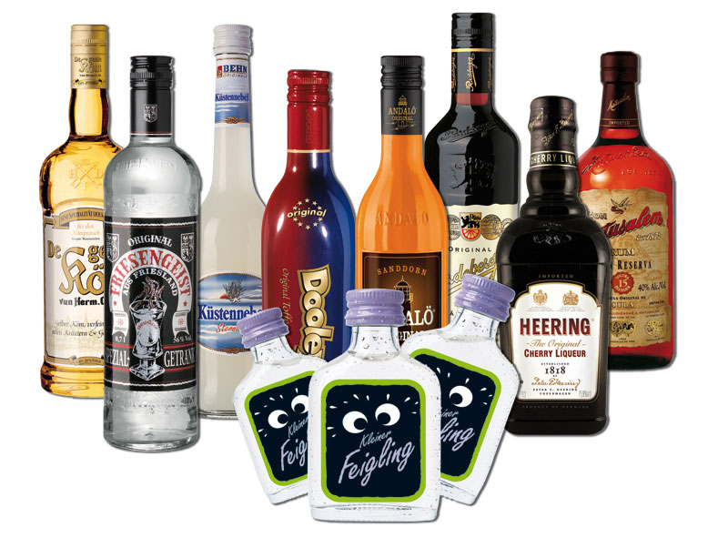 Behn Sortiment neu